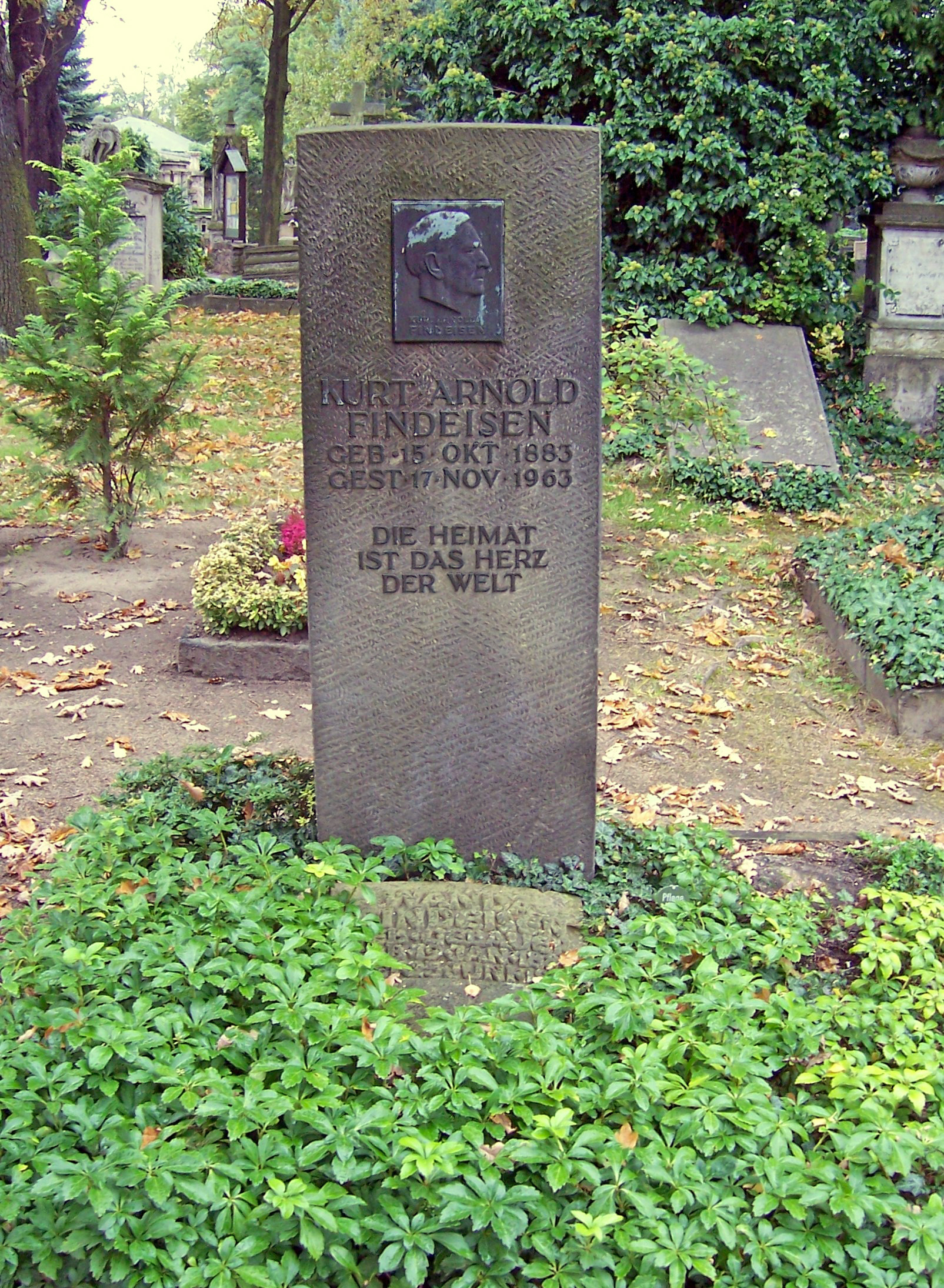 Grab des deutschen Schriftstellers Kurt Arnold Findeisen auf dem Trinitatisfriedhof in Dresden.